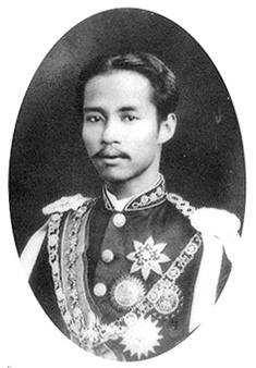 A young King Chulalongkorn